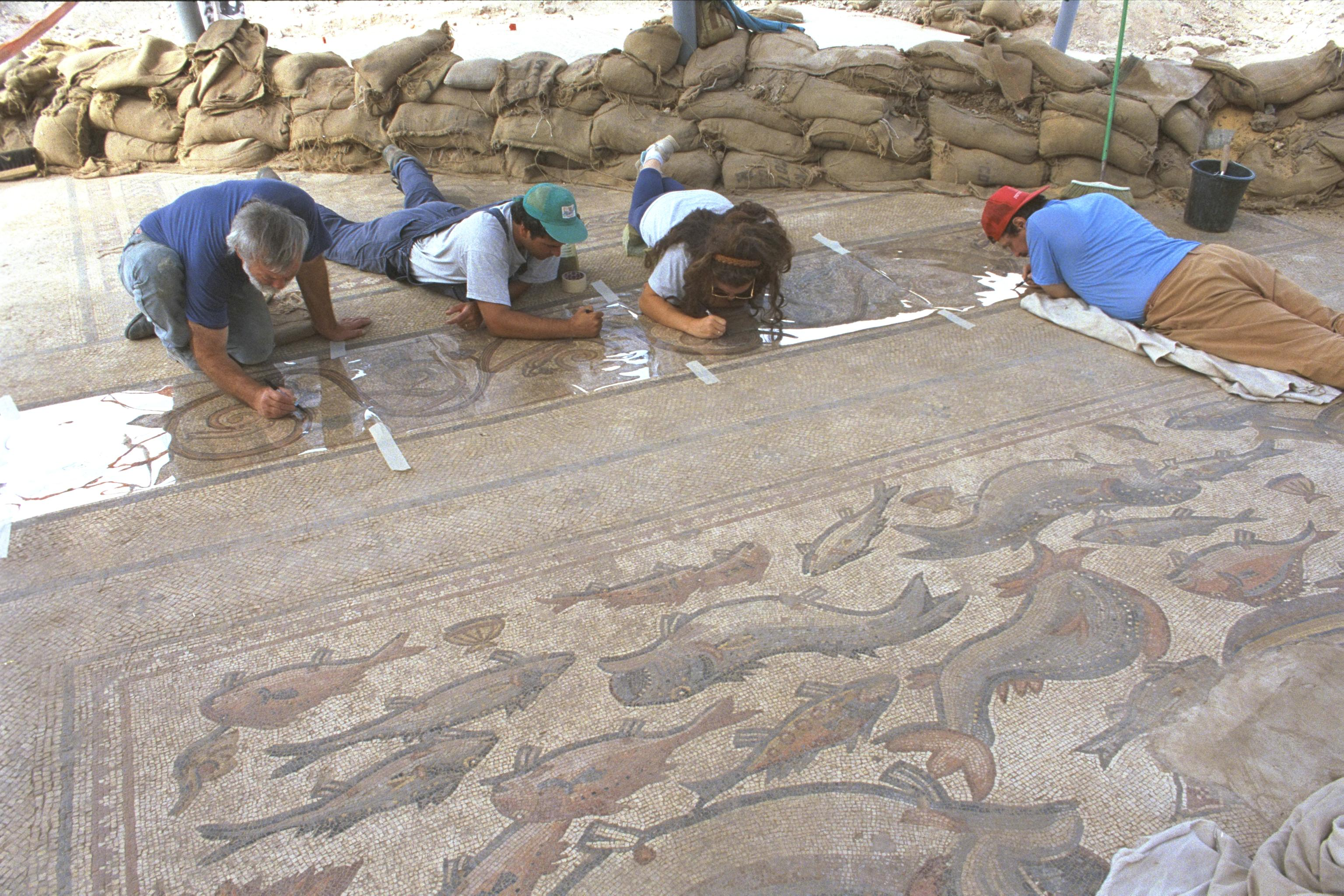 Archeologists treat a 4th-century mosaic depicting animals uncovered during construction of a road in Lod. ארכיאולוגיה ועתיקות ליד העיר לוד. בצילום, ארכיאולוגים מטפלים בפסיפס של ציורי חיות מהמאה הרביעית אשר התגלה ליד העיר לוד.ت